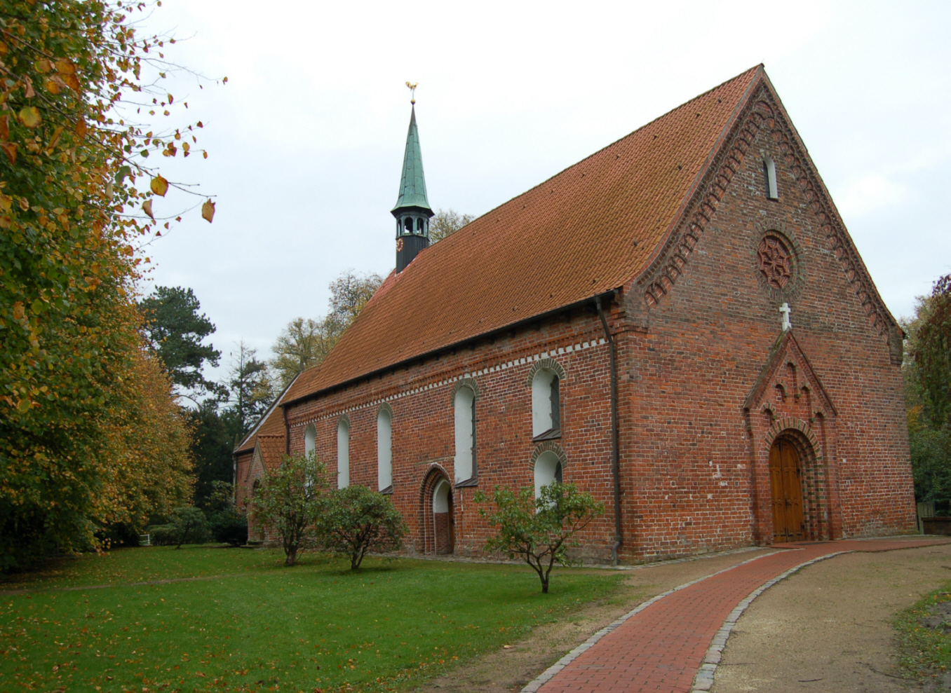 Haseldorfer Kirche aus dem 13. Jahrhundert